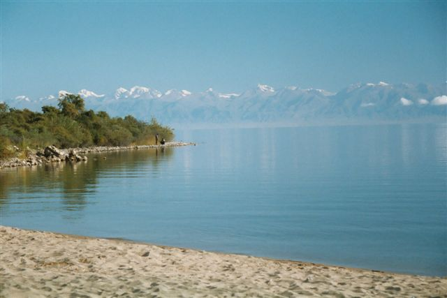 Eigen foto